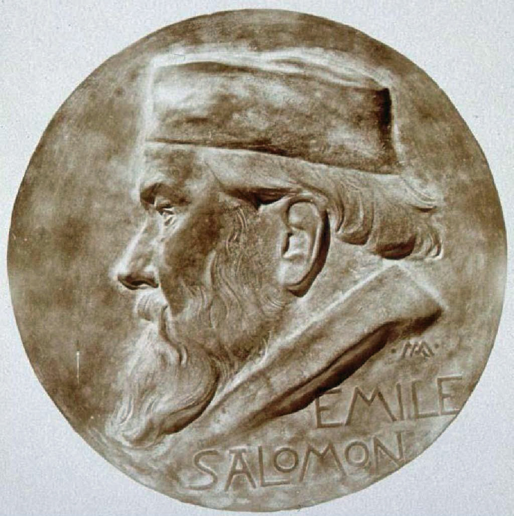 Médaillon en bronze de A. Marzolff représentant Emile Salomon. Bibliothèque nationale et universitaire de Strasbourg